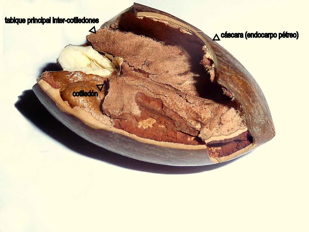 Carya illinoinensis (Nuez de Pecán) - Trima abierta sin su epicarpio ni mesocarpio, con un de los dos cotiledones de la semilla in situ en su endocarpio pétreo y el tabique principal de separación inter-cotiledones. - Comercio, procedencia desconocida, Madrid (España).